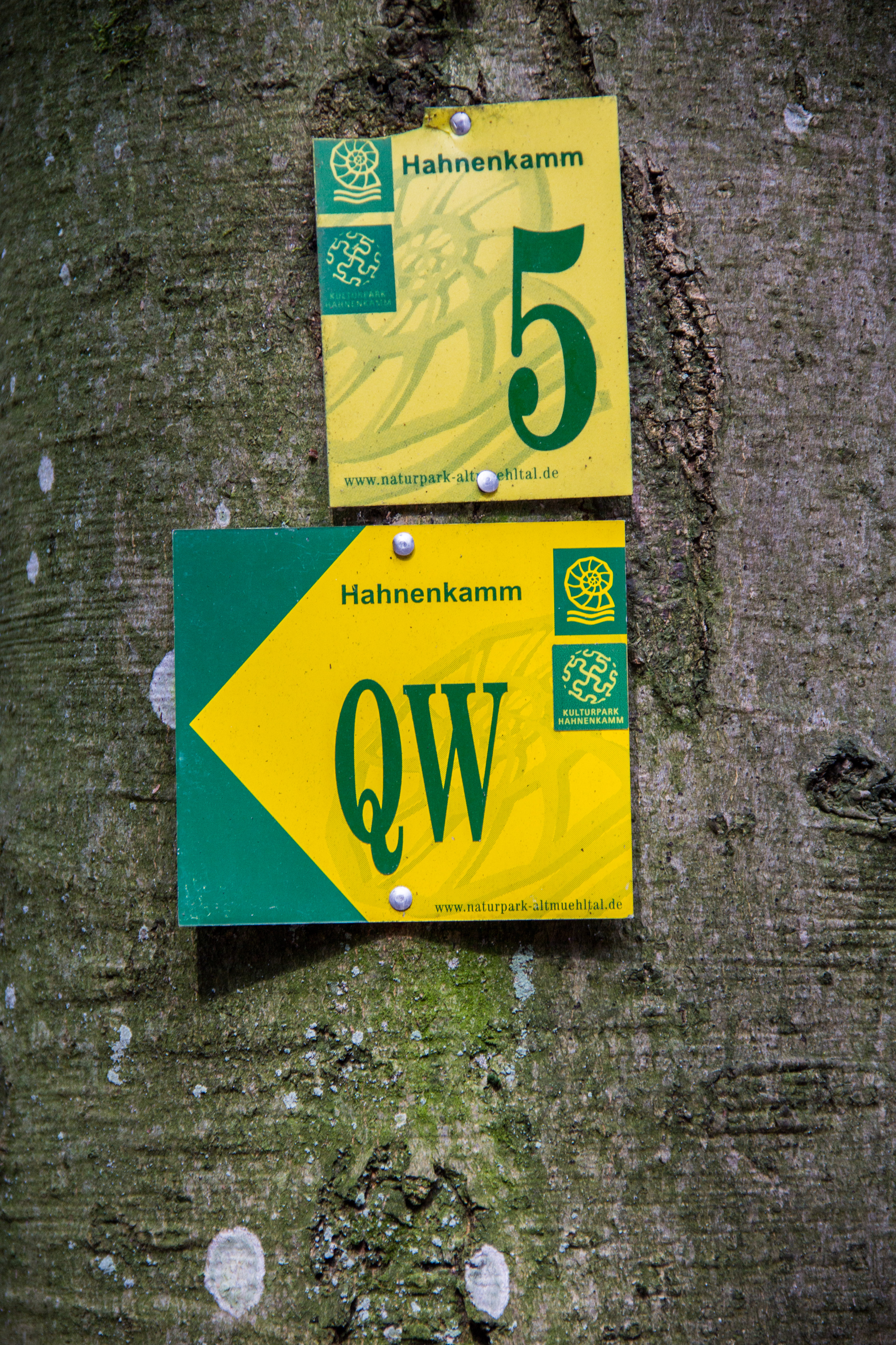 Sieben Quellen, Heidenheim, Wanderweg "Quellenweg"